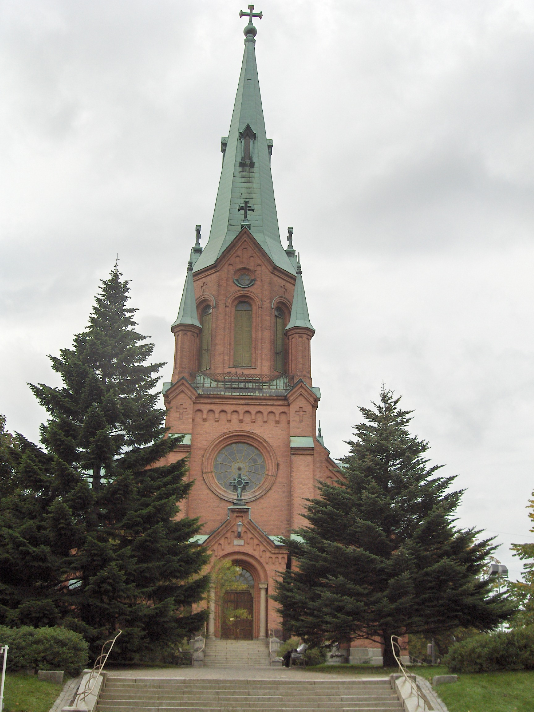 Alexander Church in Tampere, Finland